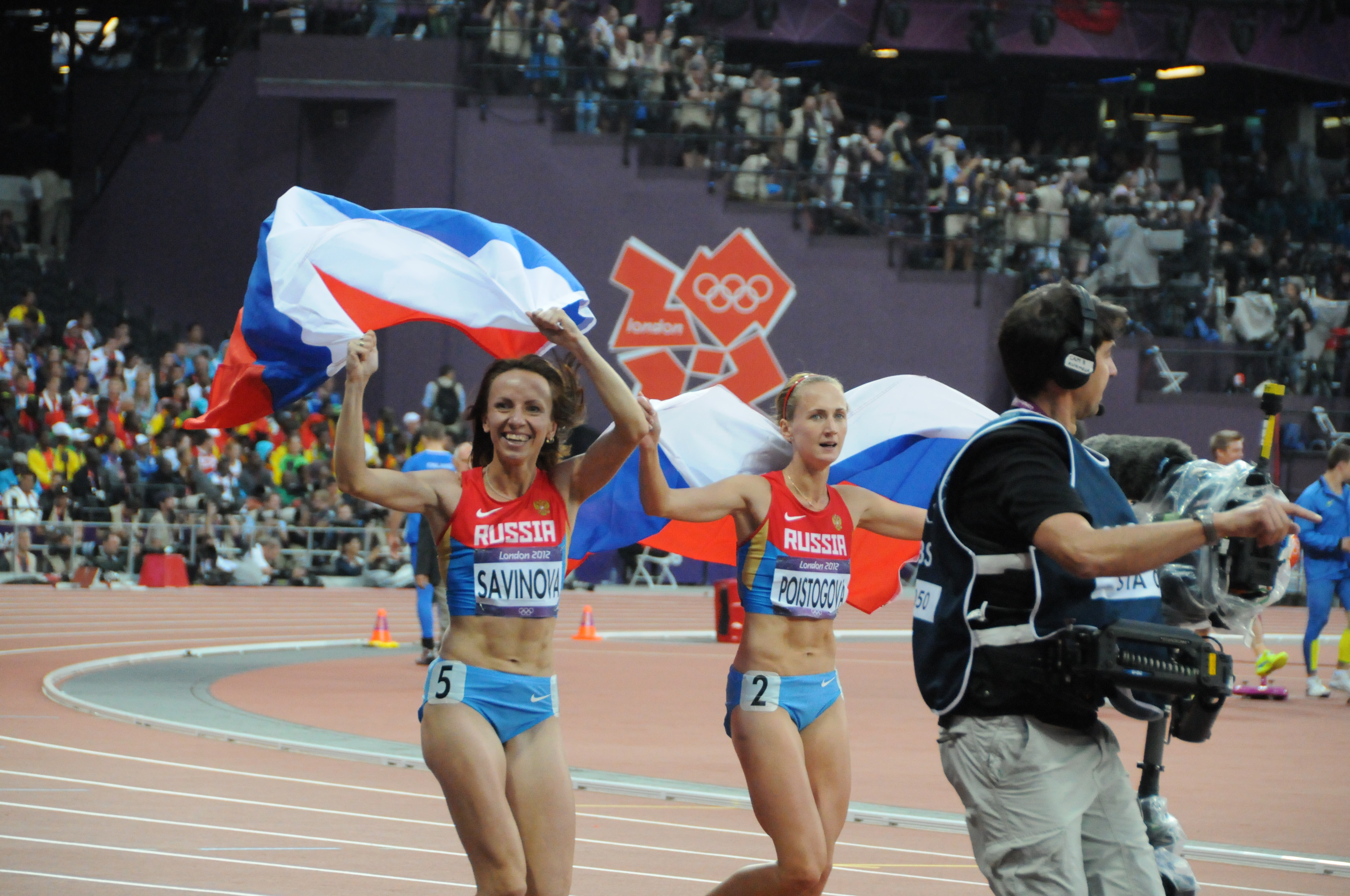 La médaille d'or et de bronze du 800m: Mariya Savinova et Ekaterina Poistogova